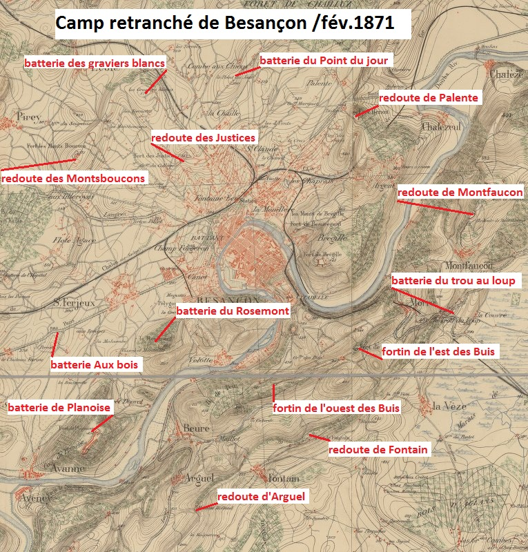 Emplacement des redoutes et batteries implantées autour de la ville.